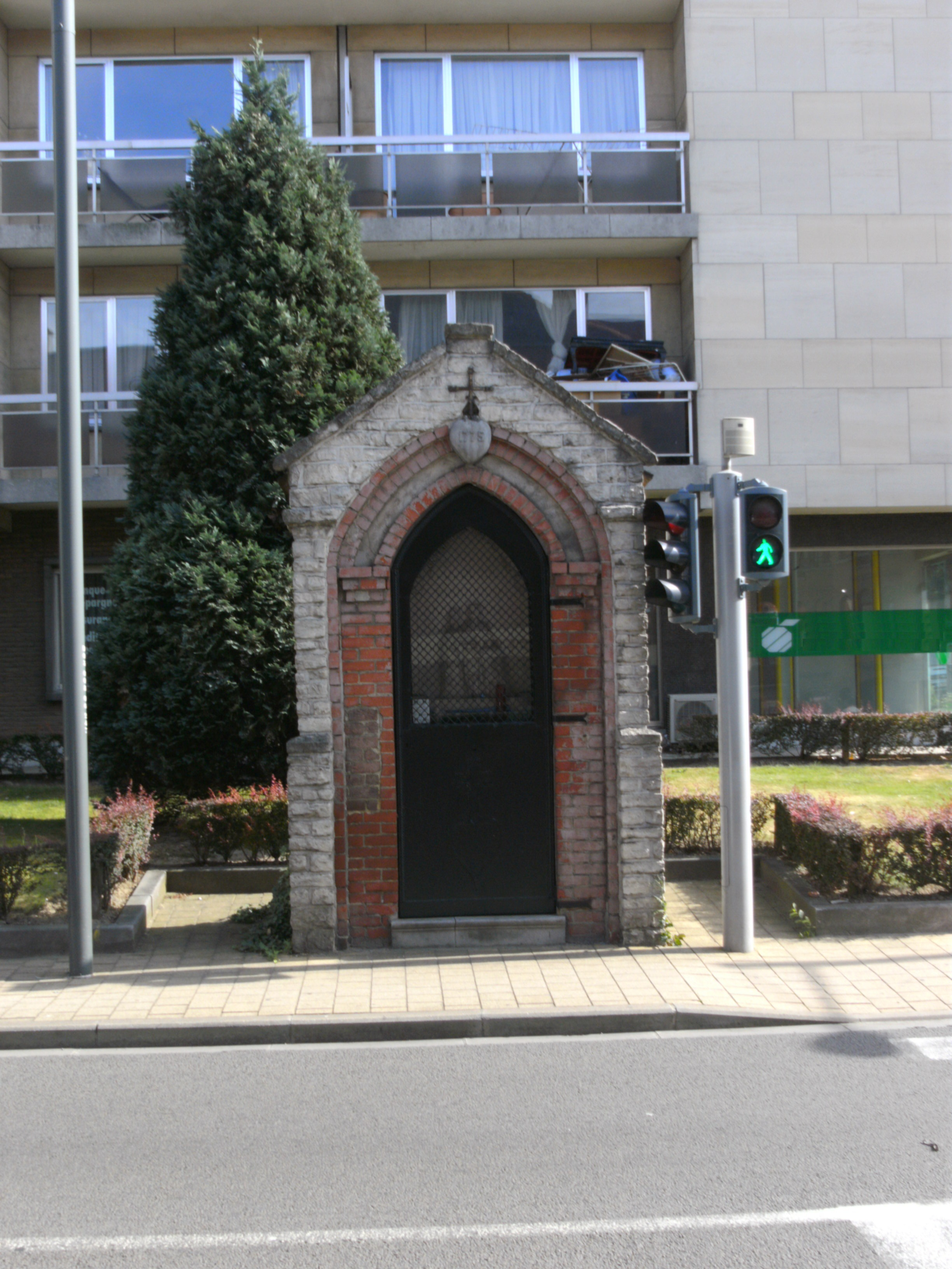 La Oud kapelleke à Evere (construction 1775)